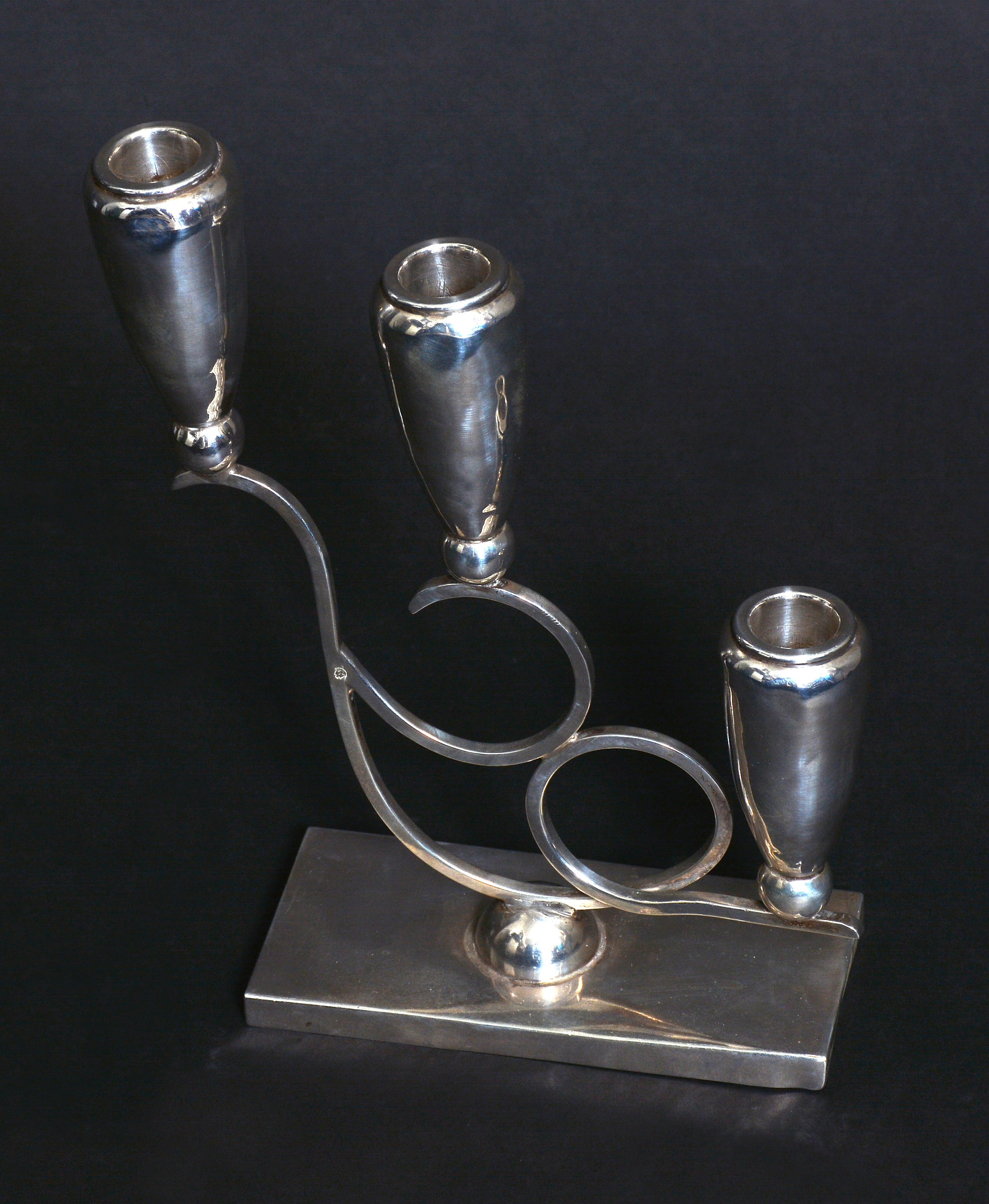 ייִדיש: מנורת שבת מכסף טהור, עיצובו ומעשה ידיו של הרב יוסף-מאיר אלפנט בראשית שנות החמישים למאה ה-20.